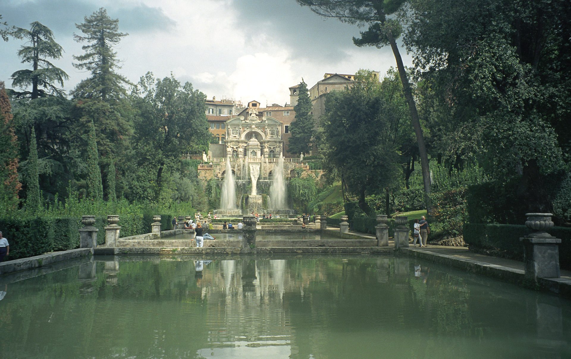 Villa d'Este, Tivoli